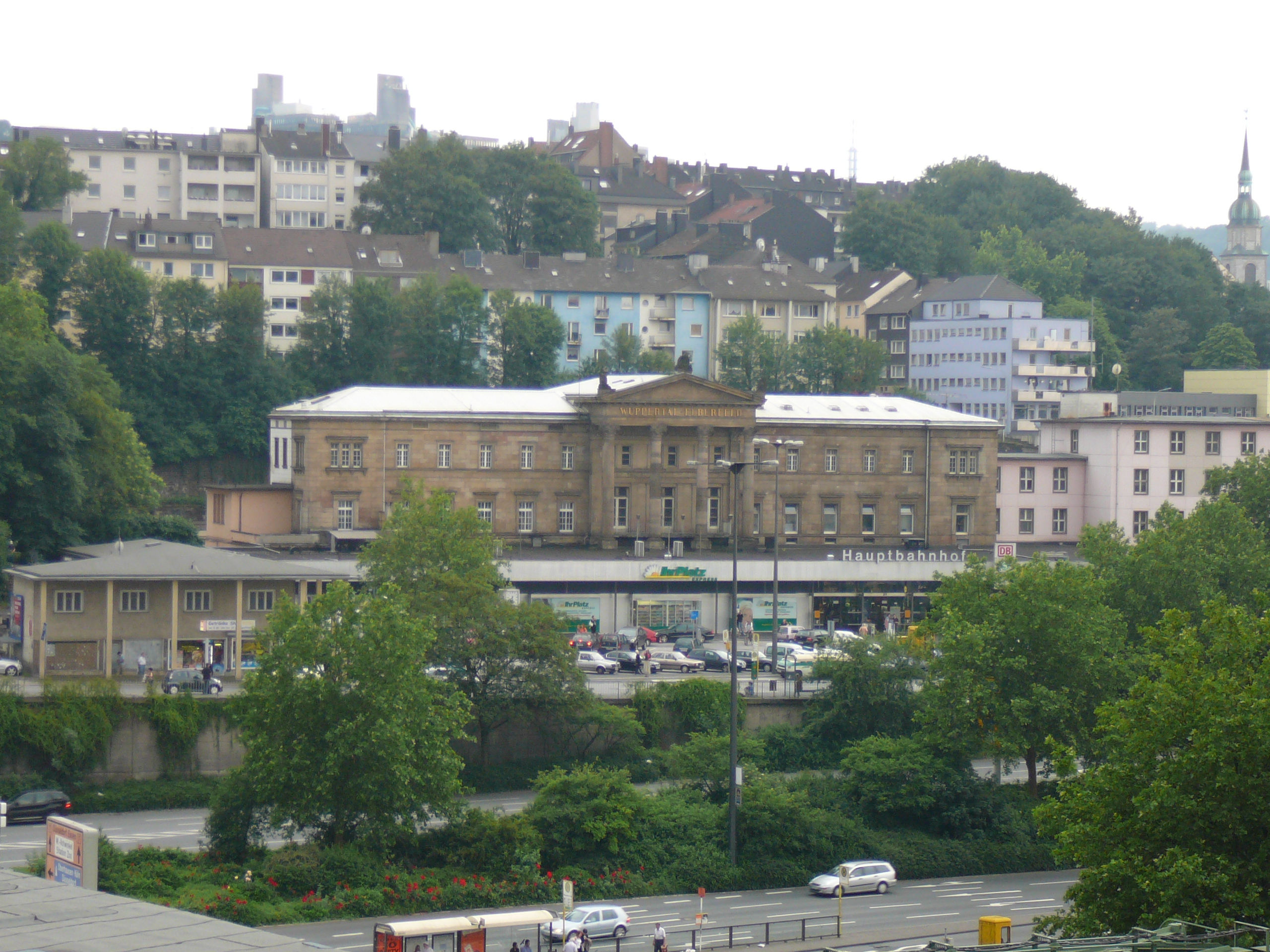 Hauptbahnhof, Wuppertal